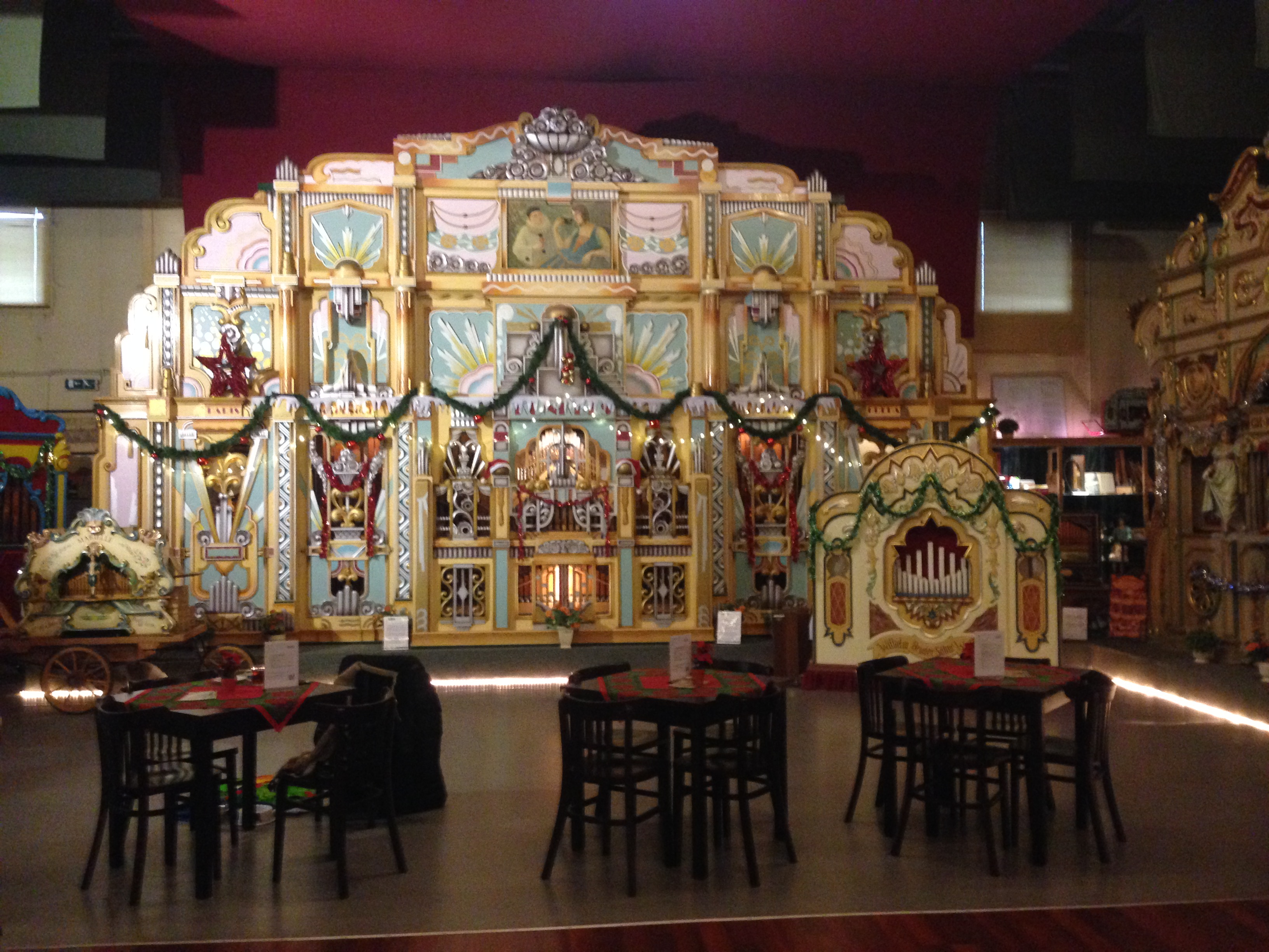 Draaiorgelmuseum, Haarlem, Netherlands